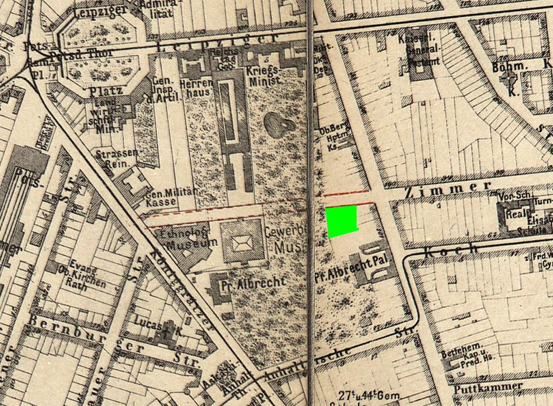 Lageplan des Römerbad-Hotels (1888-1891) in Berlin, Verlängerte Zimmerstr. 4-5.